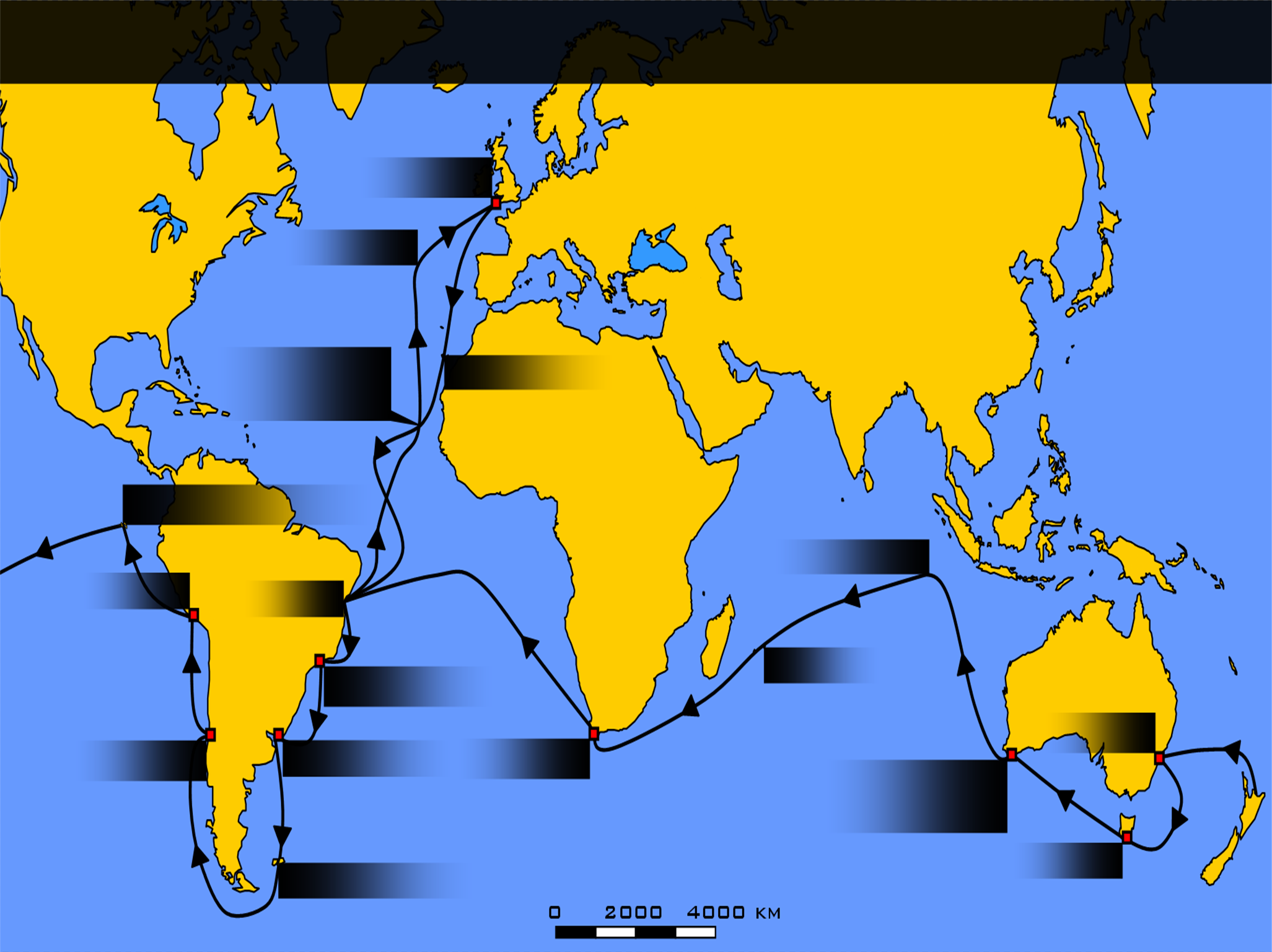 Darwins Weltumseglung ohne Beschriftung